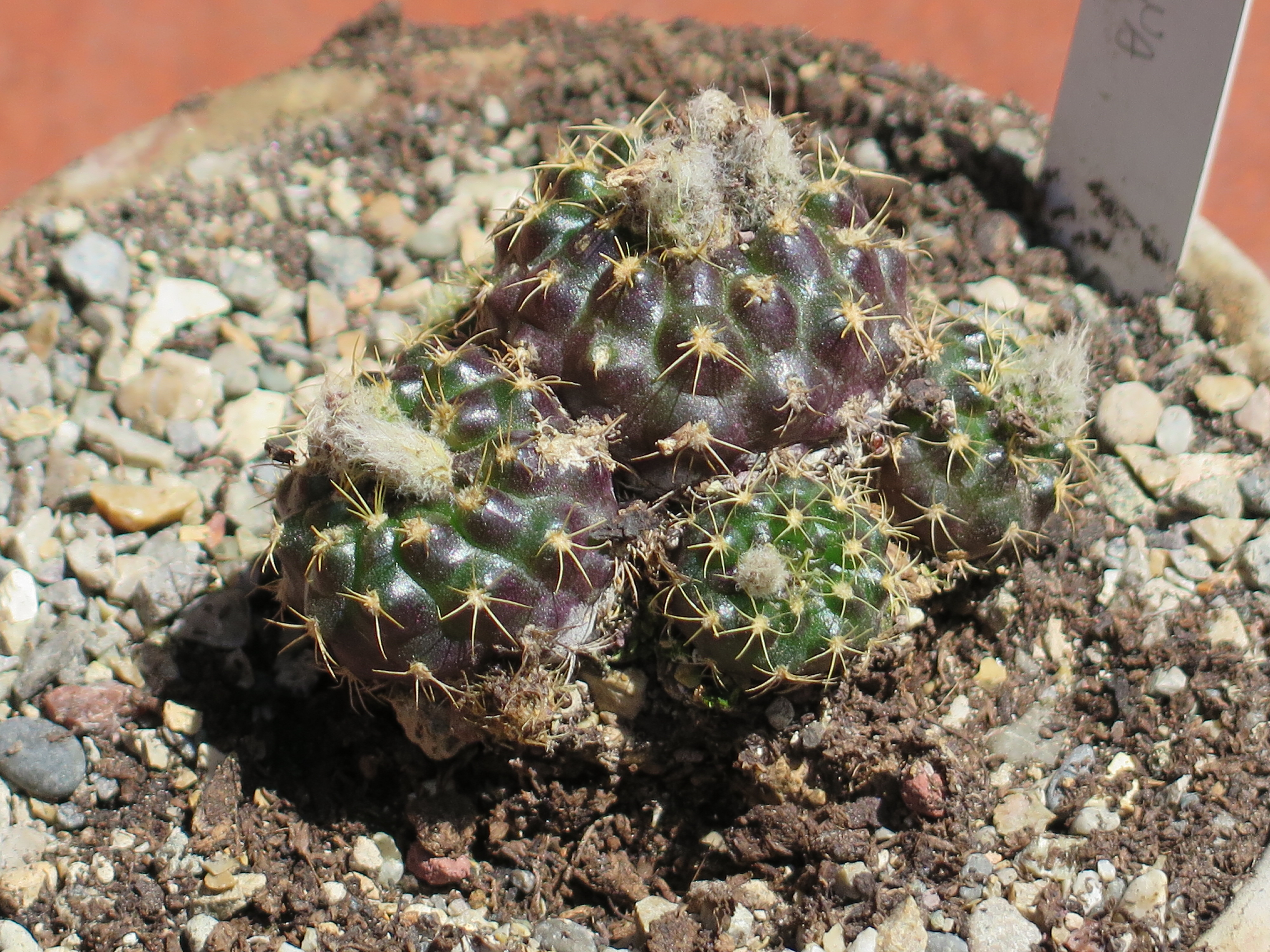 Frailea uhligiana (=Frailea cataphracta subsp. duchii